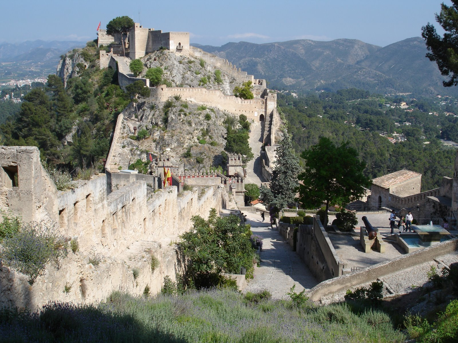 The Castle of Xàtiva with the Valley of Bixquert (Valencian Community, Spain)